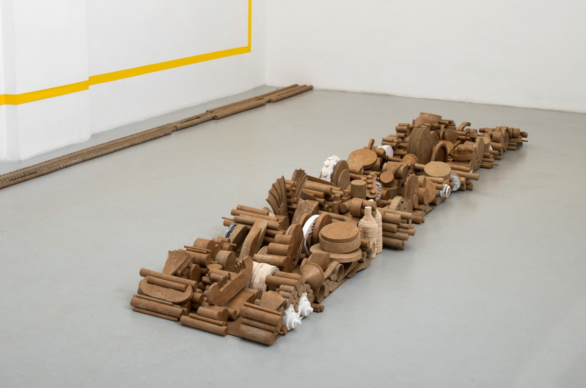 הוצג בגלריה "מקום לאמנות", קריית המלאכה תל-אביב